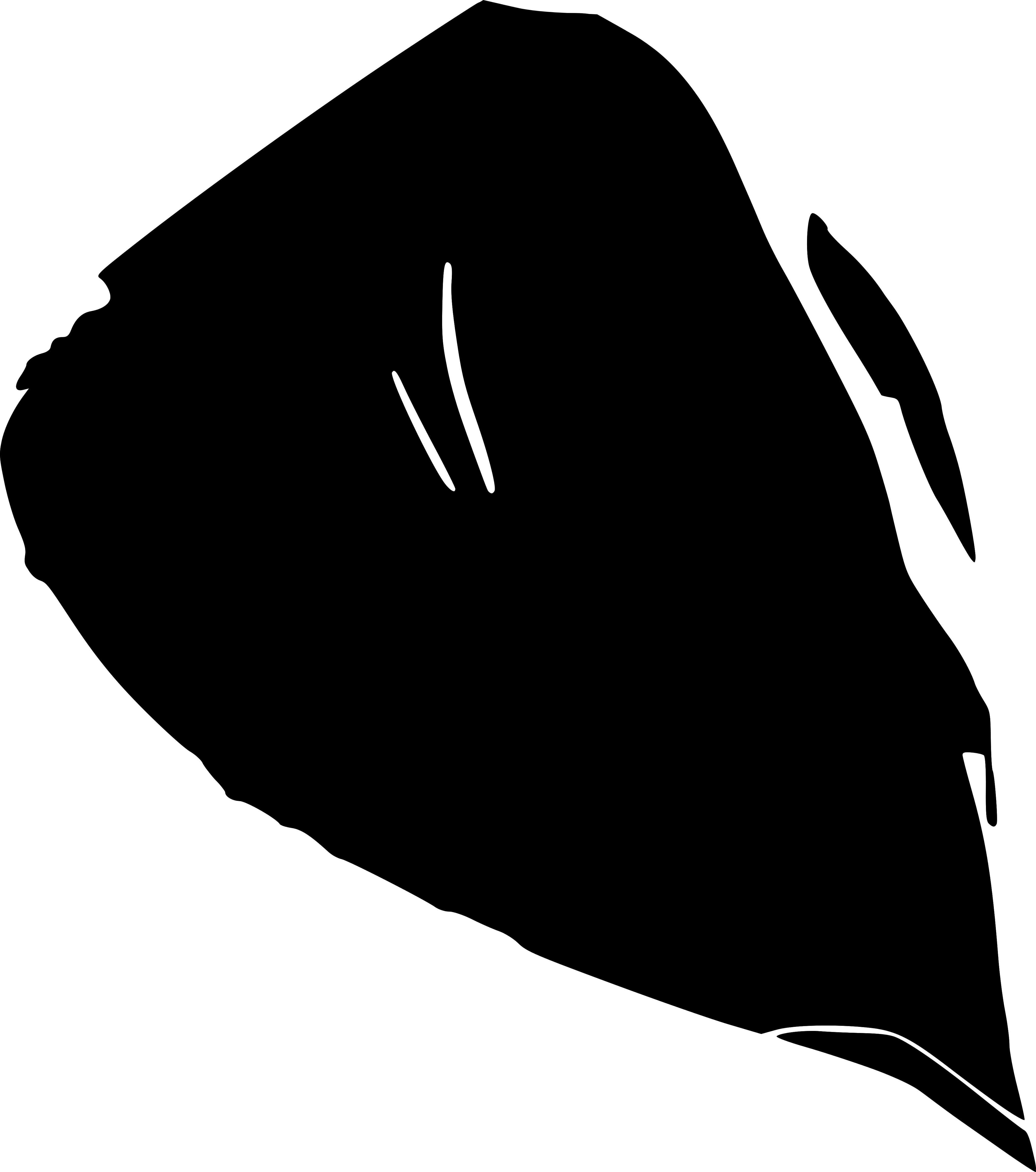 Liberland Map Vector